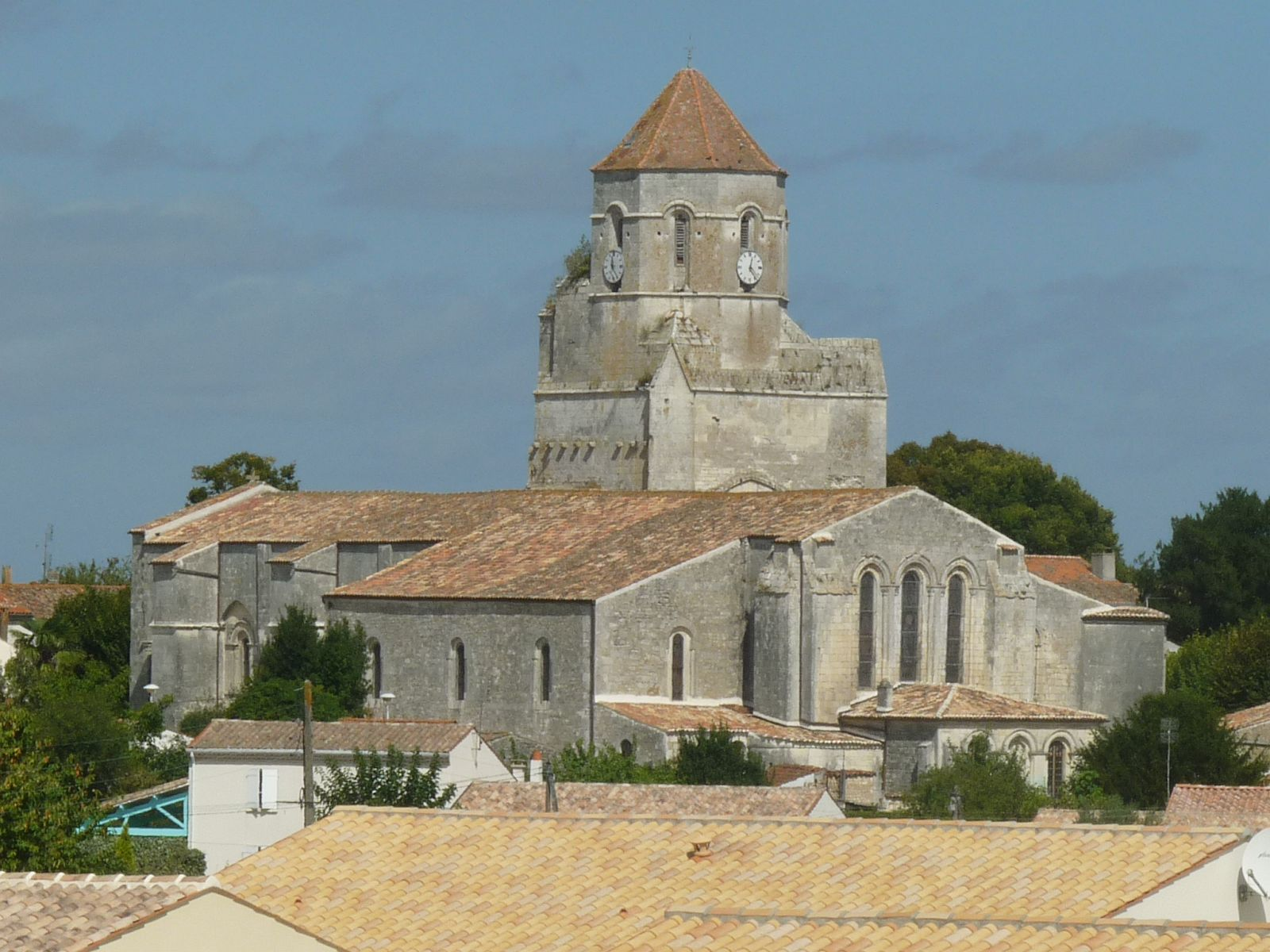 église de Cozes (17), France Le chevet plat est percé d'un triplet de hautes et minces fenêtres qui sont en plein-cintre